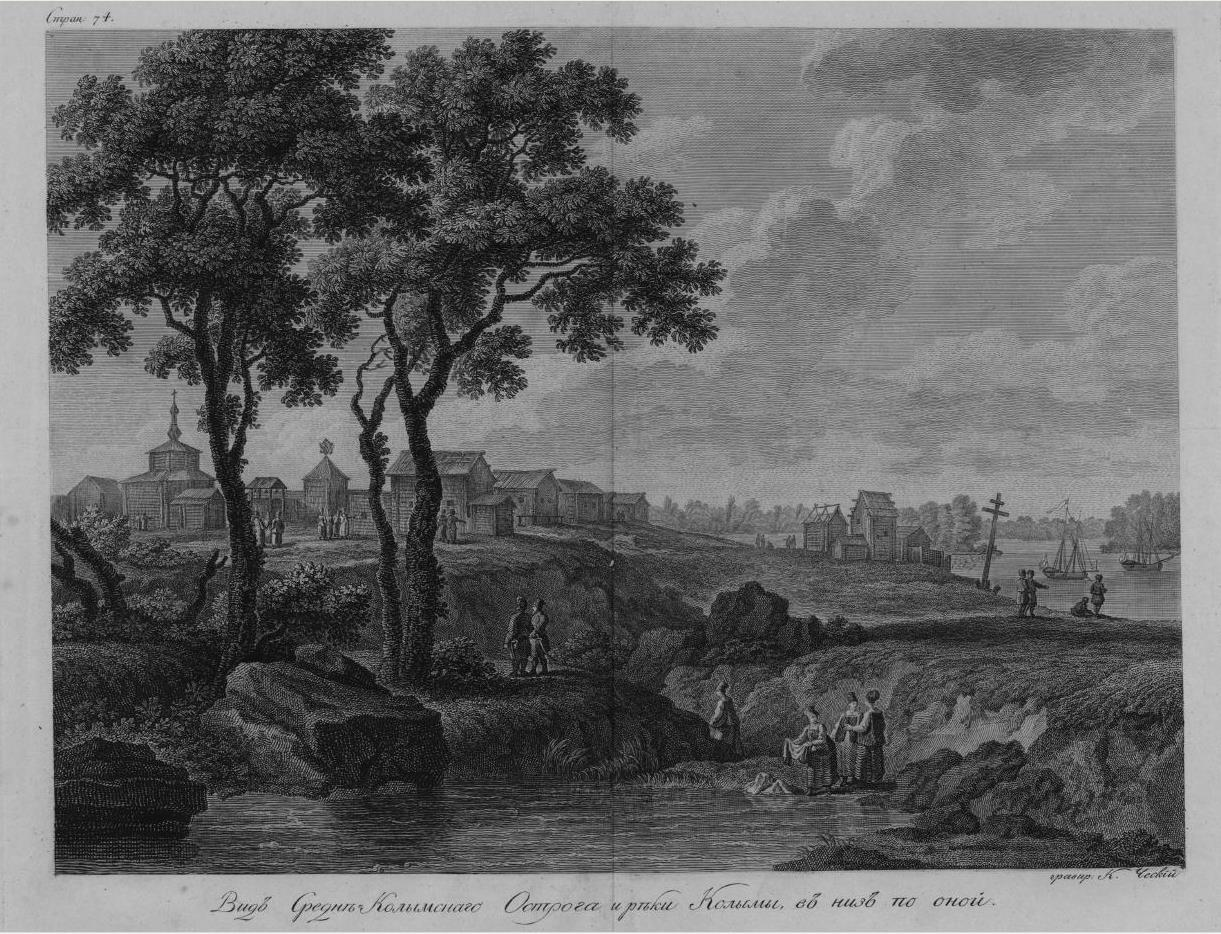 Вид Средне-Колымского острога и реки Колымы в низ по оной; Гравировал К. Ческий. Атлас карт и рисунков к путешествию в Северо - восточную часть России и на острова северной части Тихого океана флота капитана Г. Сарычева.1802.